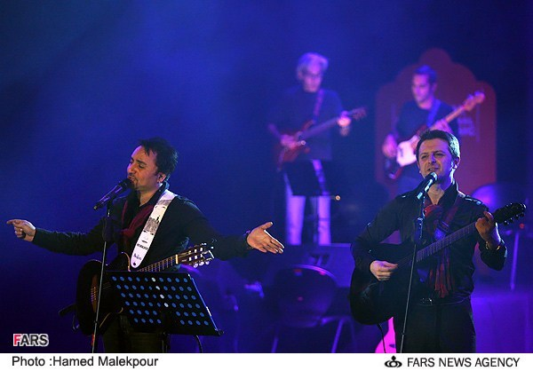 کنسرت گروه آریان